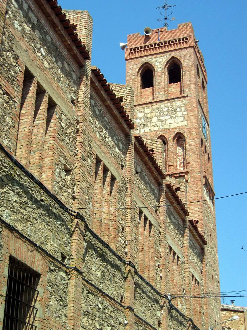 Fachada oriental de la parroquial de Torrebaja (Valencia), con el campanario al fondo.